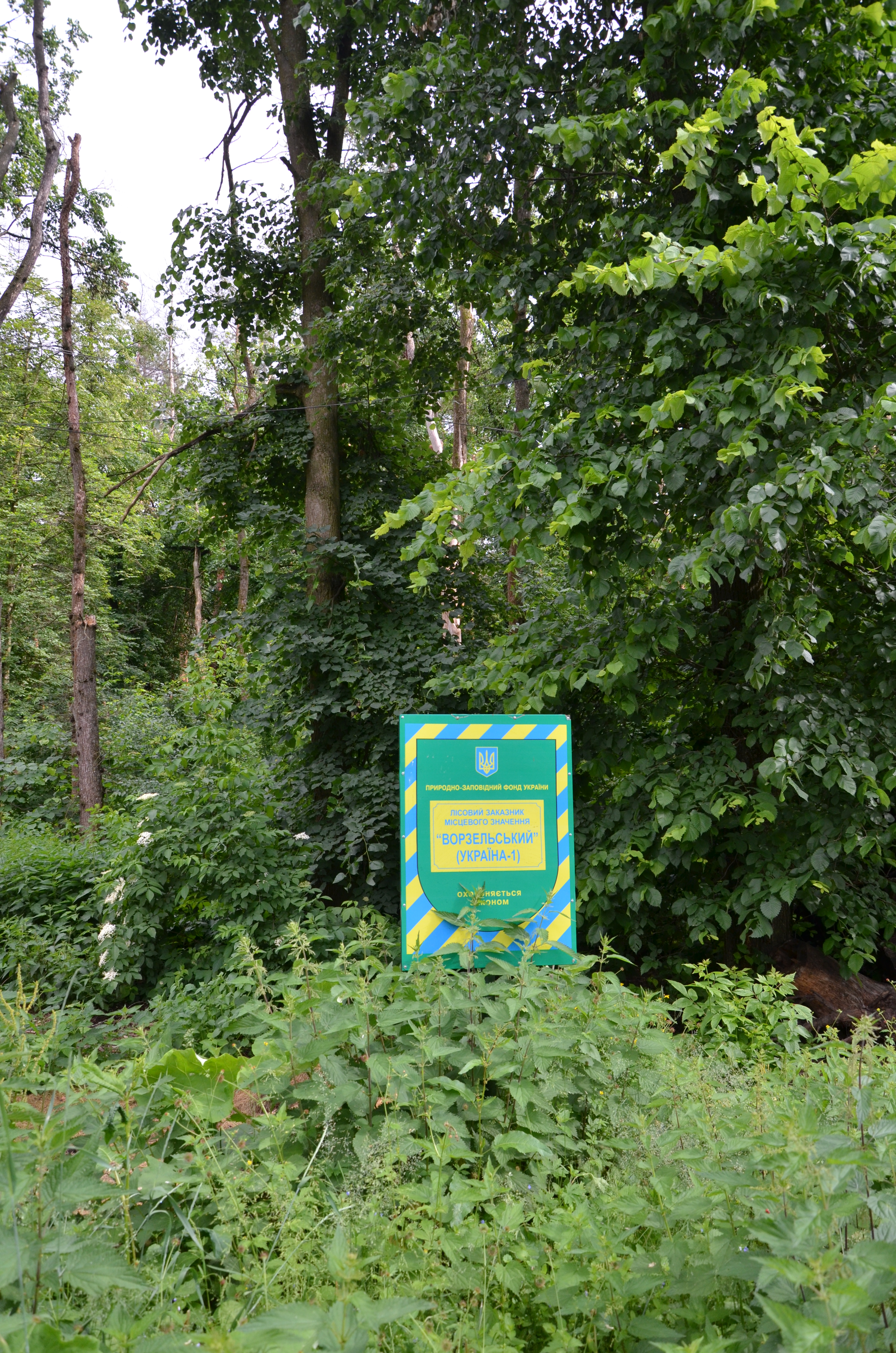 «Ворзельський», Ірпінь, Ворзельська селищна рада